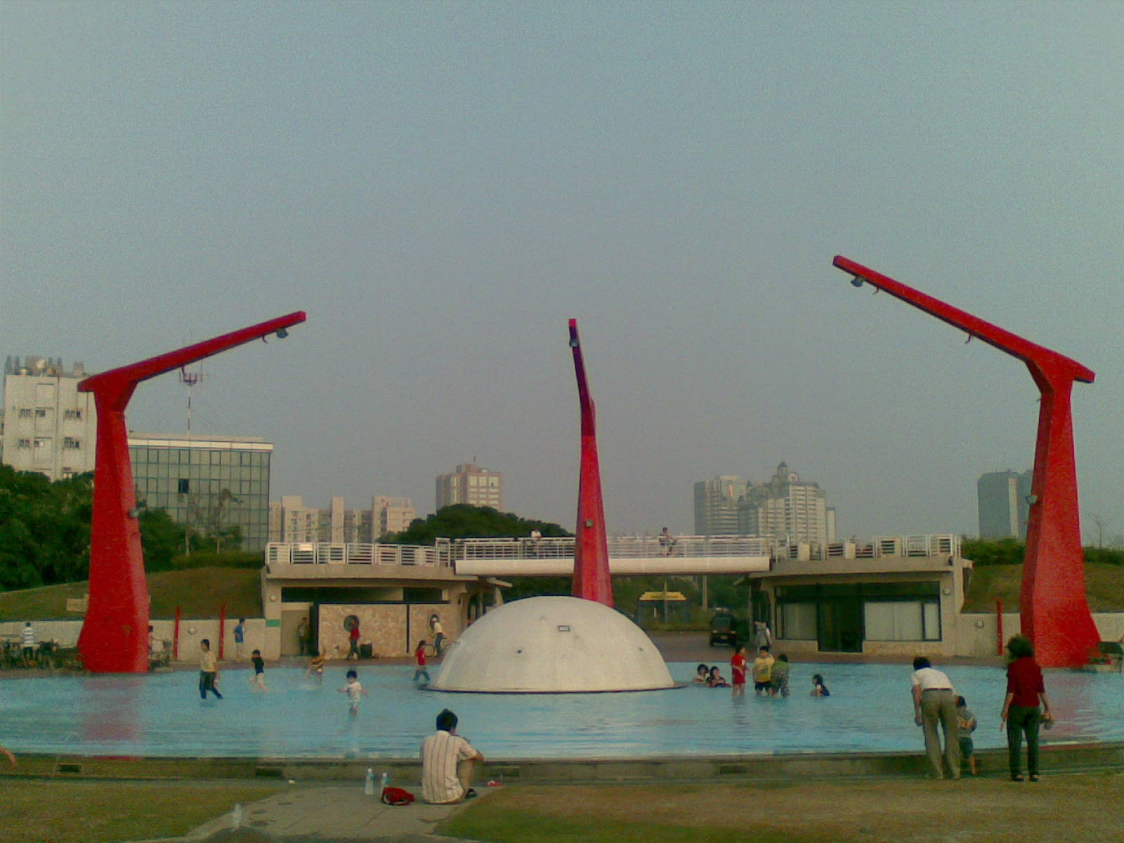 中文（台灣）: 新光碼頭的海洋之星